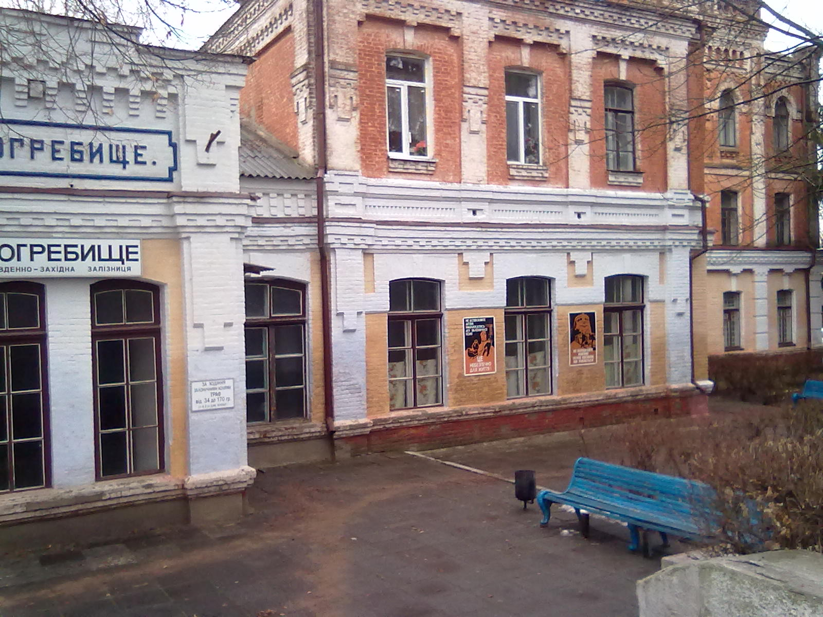 з Боку станції